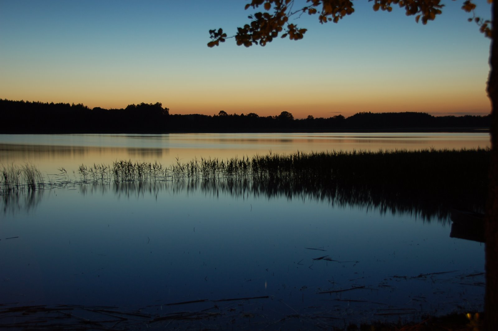 Sartų ežeras vakare